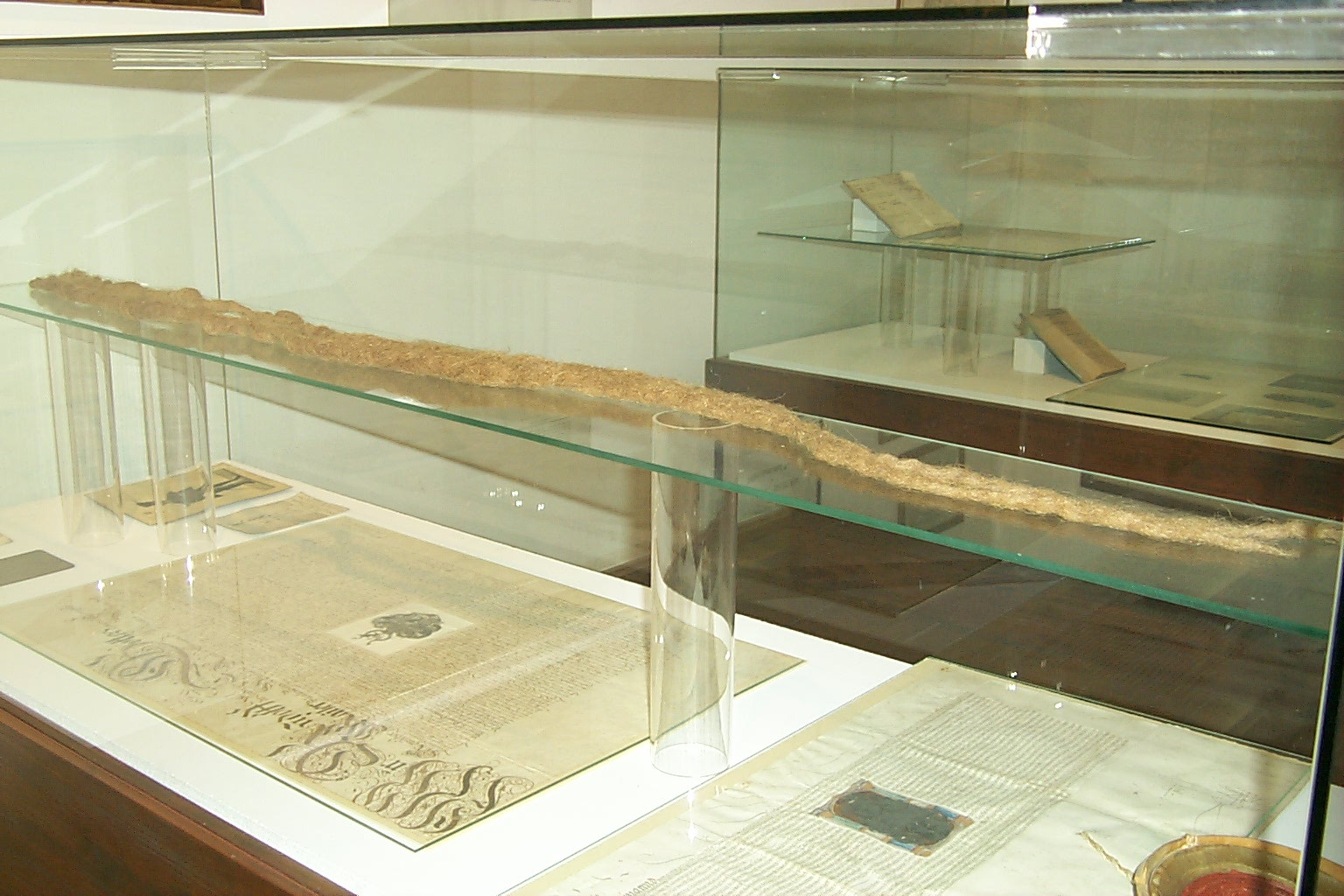 original Barthaar des Hans Staininger, Eigentum des Bezirksmuseums Braunau am Inn